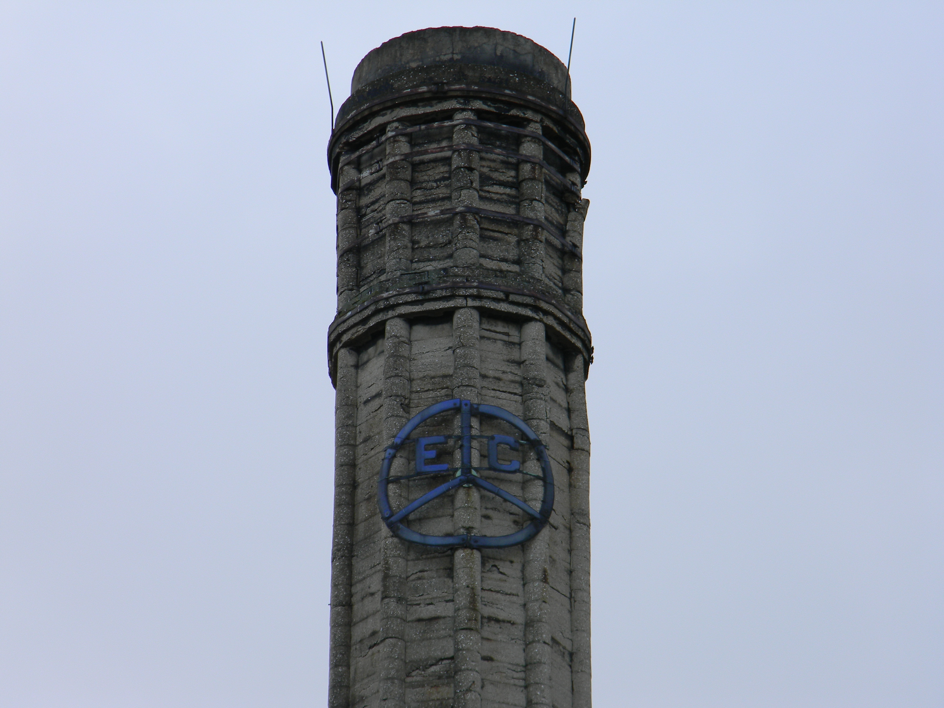 Zoom sur une cheminée de l'usine Grammont : on peut y lire les initiales "EC" (Étienne-Claude), le "G" de Grammont, en bas, ayant disparu.